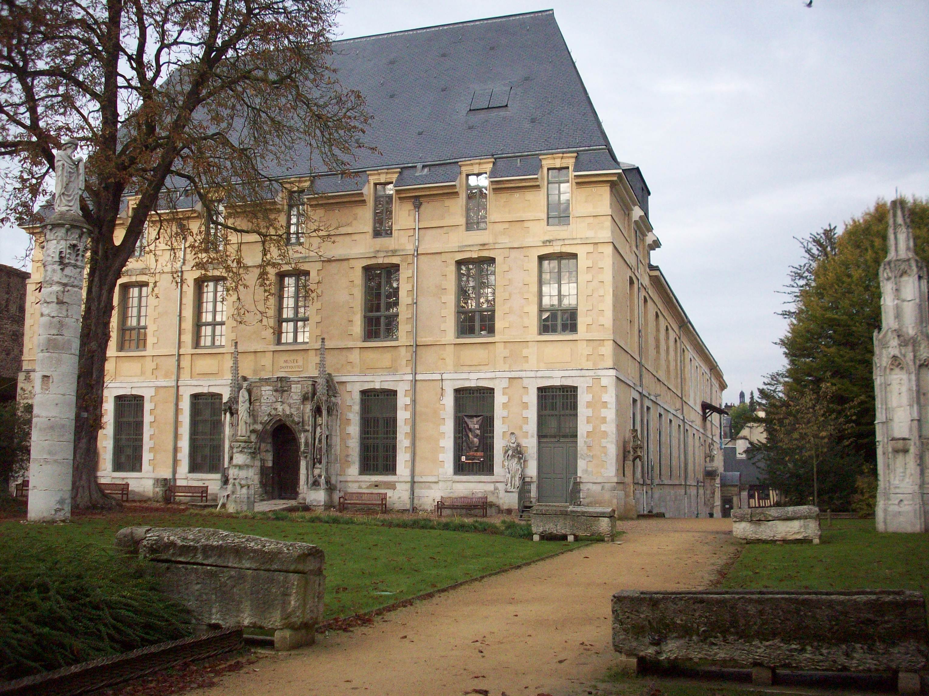 Ancien couvent de la Visitation, aujourd'hui le musée des antiquités et son jardin, à Rouen.